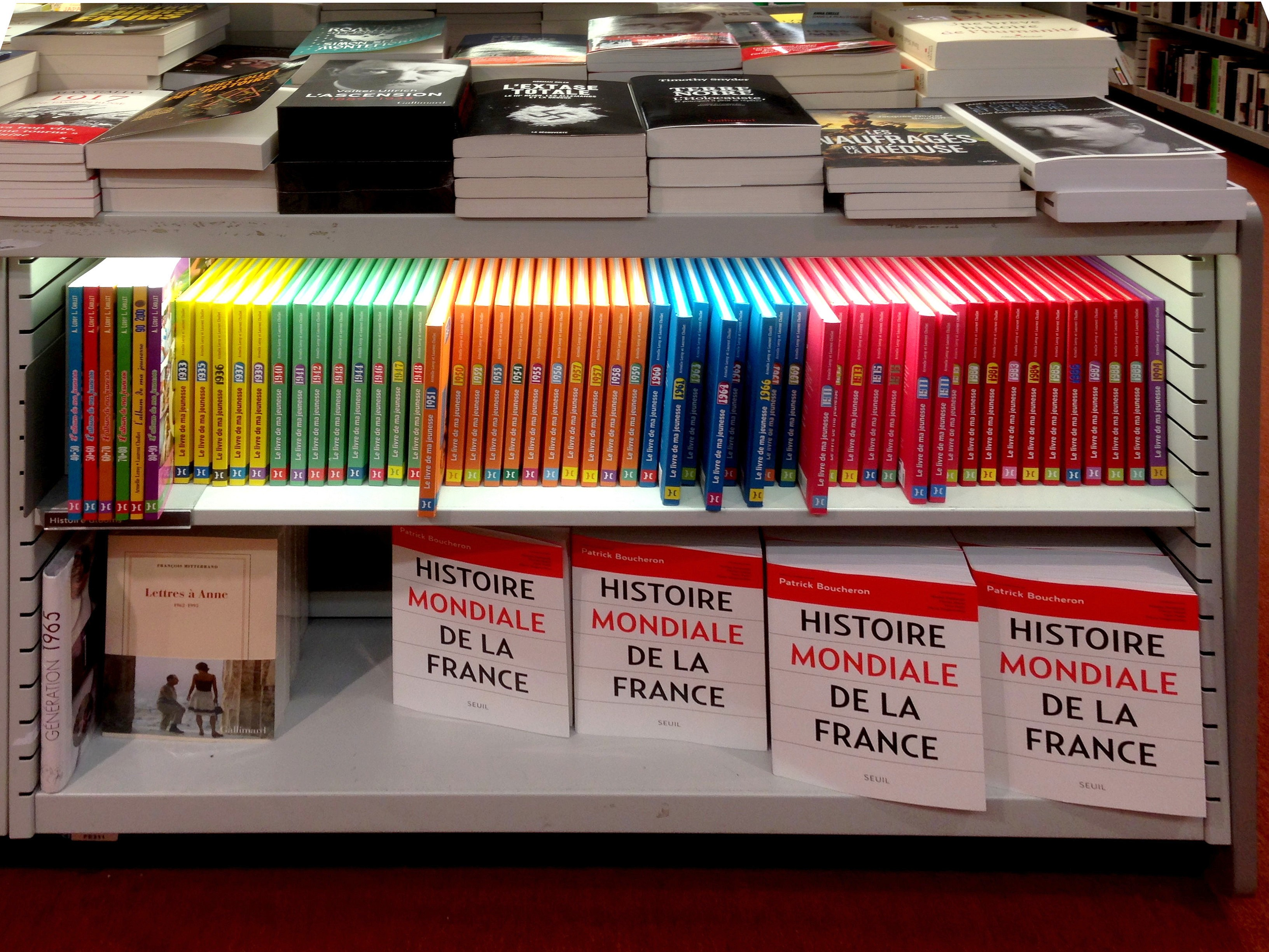 Rayon histoire d'une librairie française en février 2017.